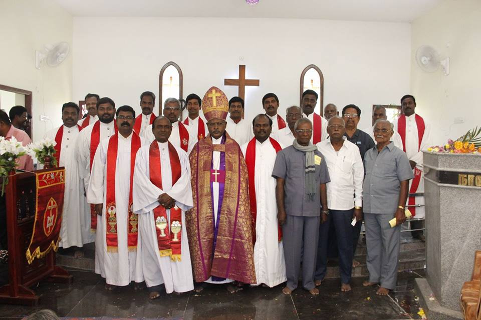 இத்திருச்சபையின் பேராயராக தற்போது அதி வண. ராஜா சாக்கிரட்டீசு உடன் சபை குருமார்கள்